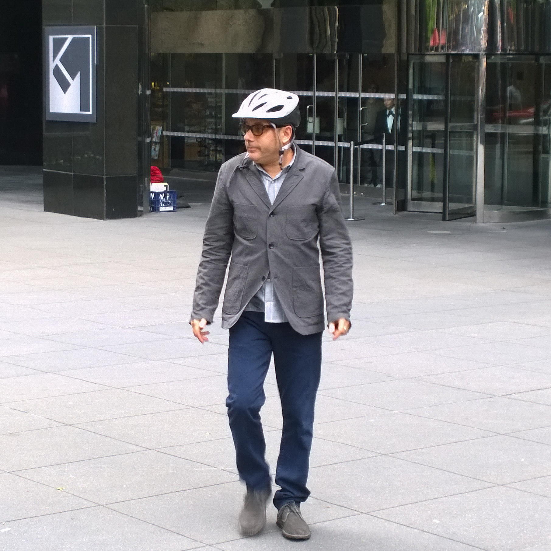 Willie Garson bei Dreharbeiten zu "White Collar" in Manhattan.